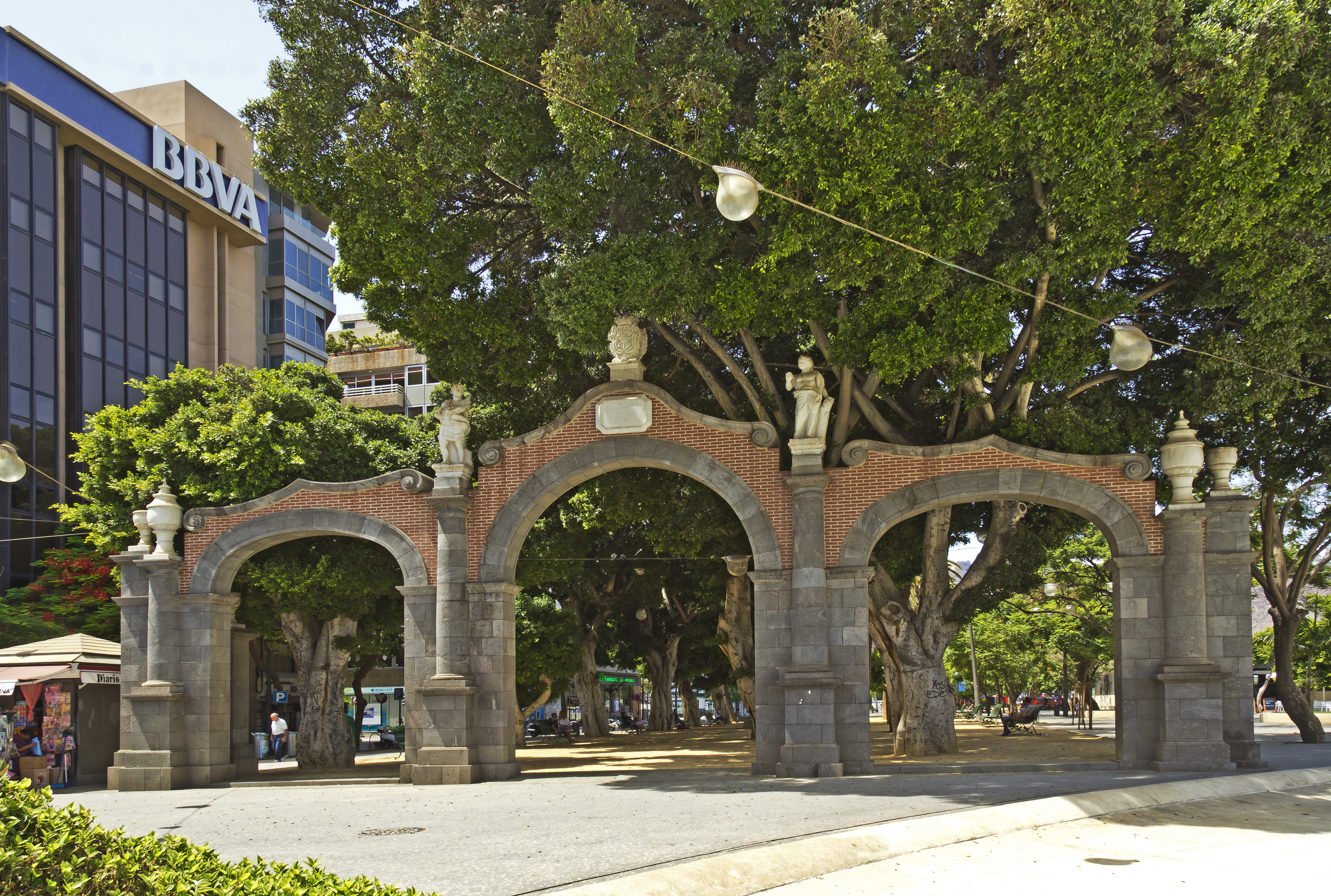 Die Replik des Torbogens am Eingang der Alameda del Duque de Santa Elena ist Teil der neugestalteten Plaza de España in Santa Cruz de Tenerife.